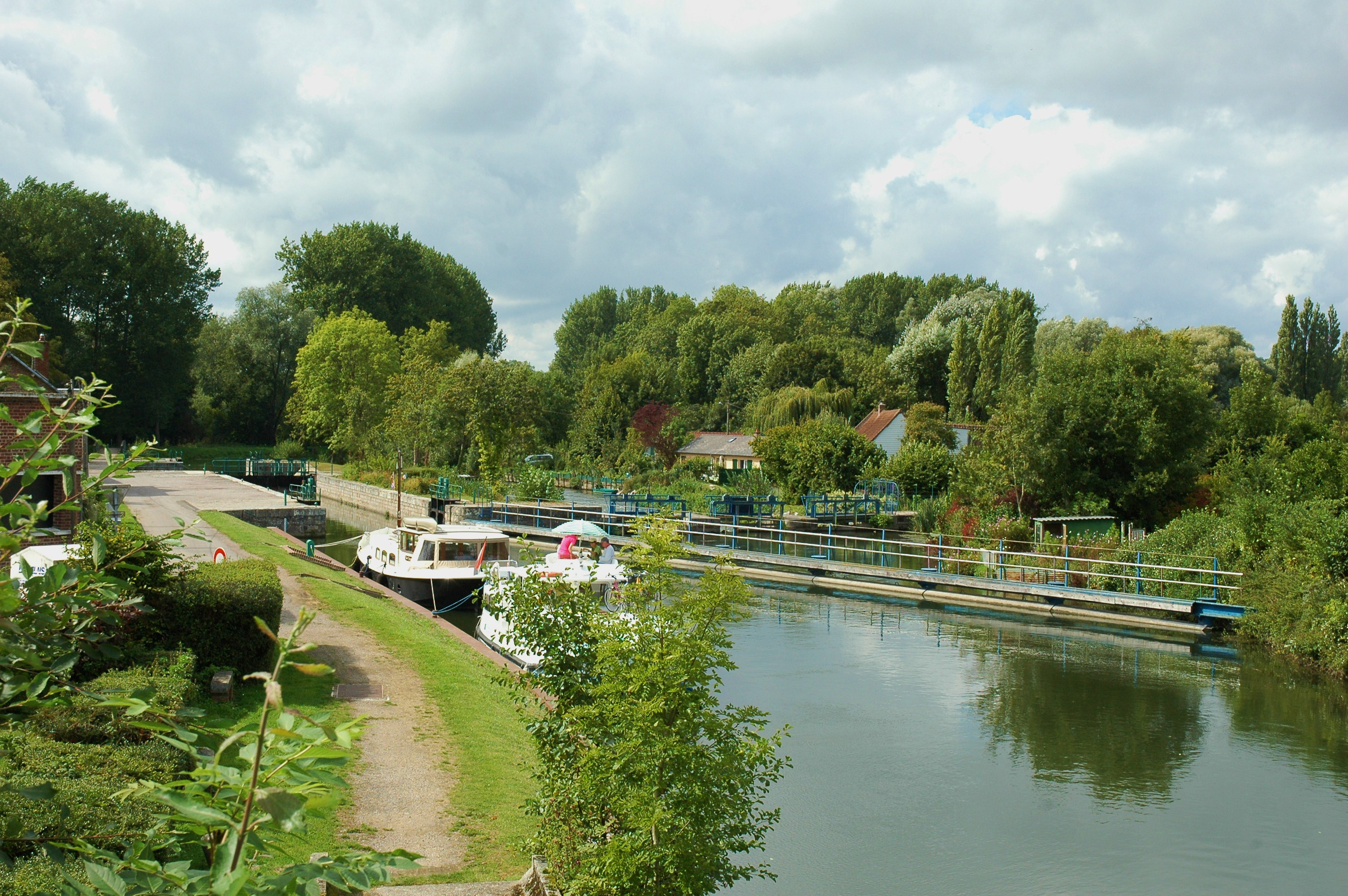 Long (Somme, France). L'écluse.